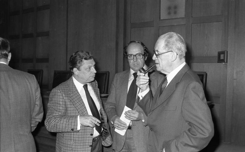 Bundeskanzler Helmut Schmidt in Berlin (West) auf Sitzung des SPD-Vorstandes und des SPD-Parteirats im Rathaus Schöneberg (links: Kurt Neubauer, rechts: Herbert Wehner)